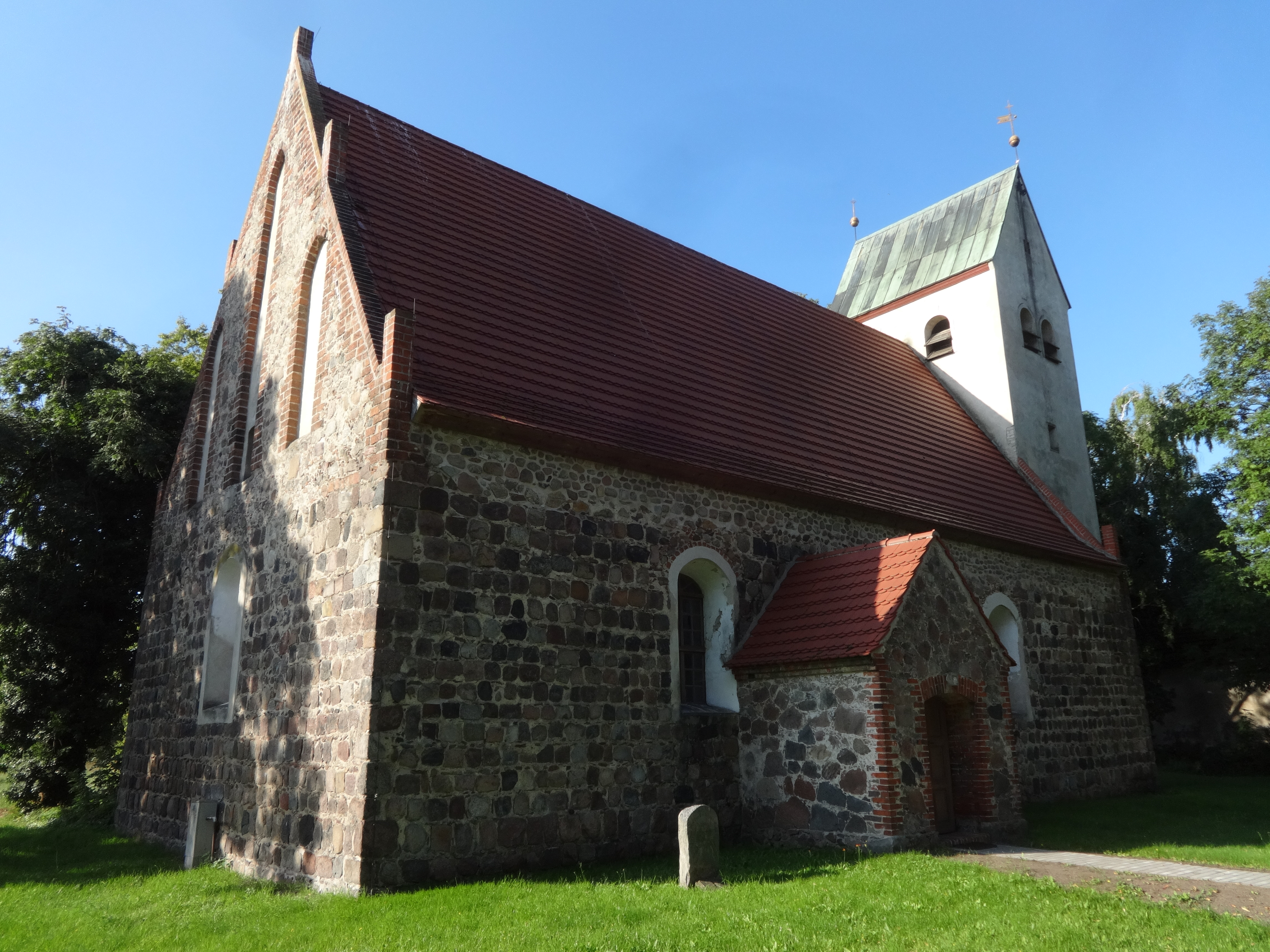 Die Feldsteinkirche in Waßmannsdorf wurde vermutlich in der Mitte des 13. Jahrhunderts errichtet wurde. 1926 kam der Westturm hinzu. In ihrem Innern steht unter anderem ein hölzerner Kanzelaltar aus dem Anfang des 18. Jahrhunderts.